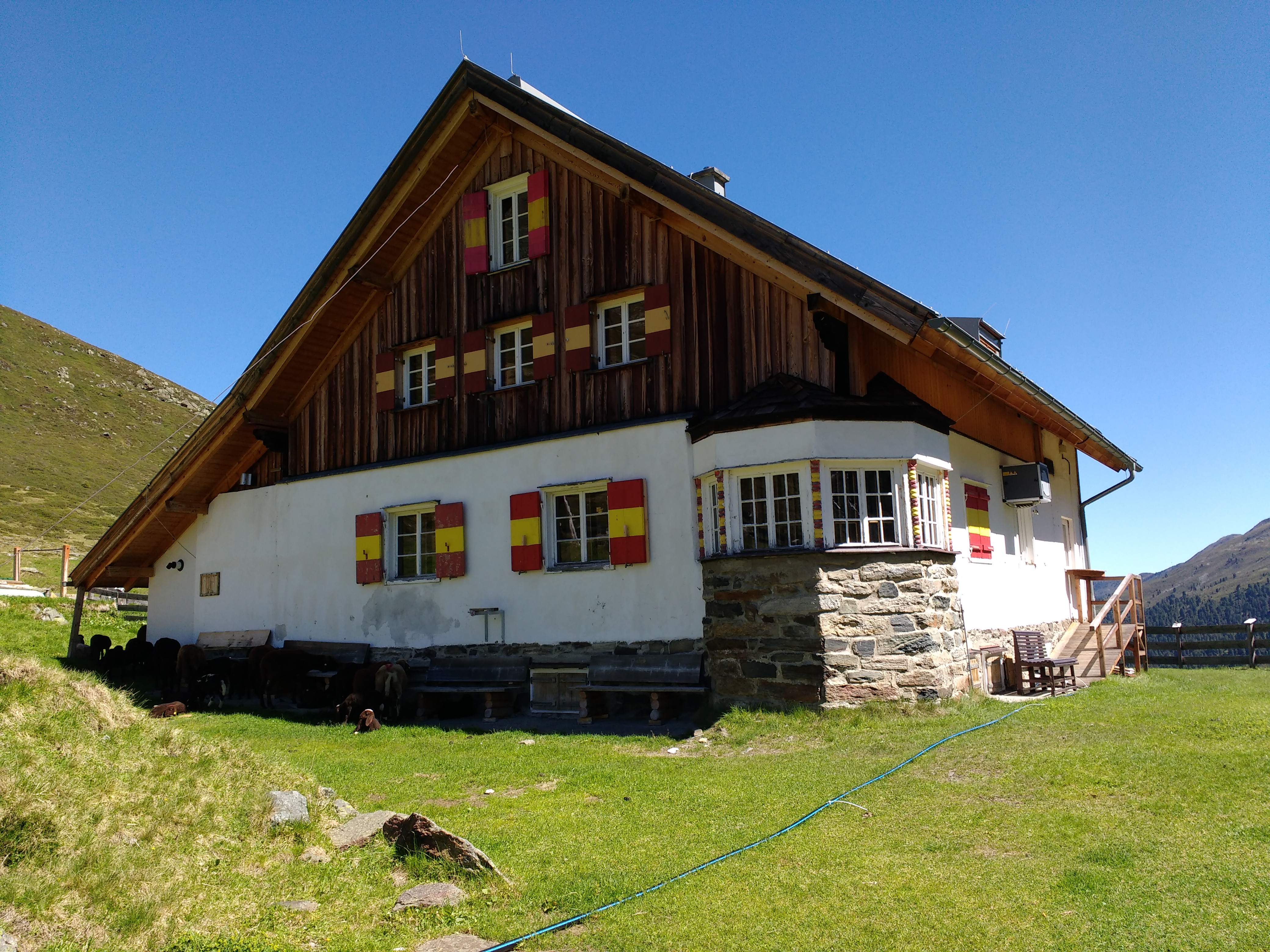 Potsdamer Hütte blieb im Sommer 2017 wegen eines Küchenbrands geschlossen.